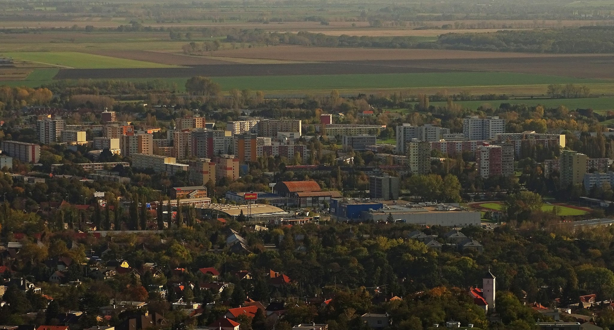 Chrenová